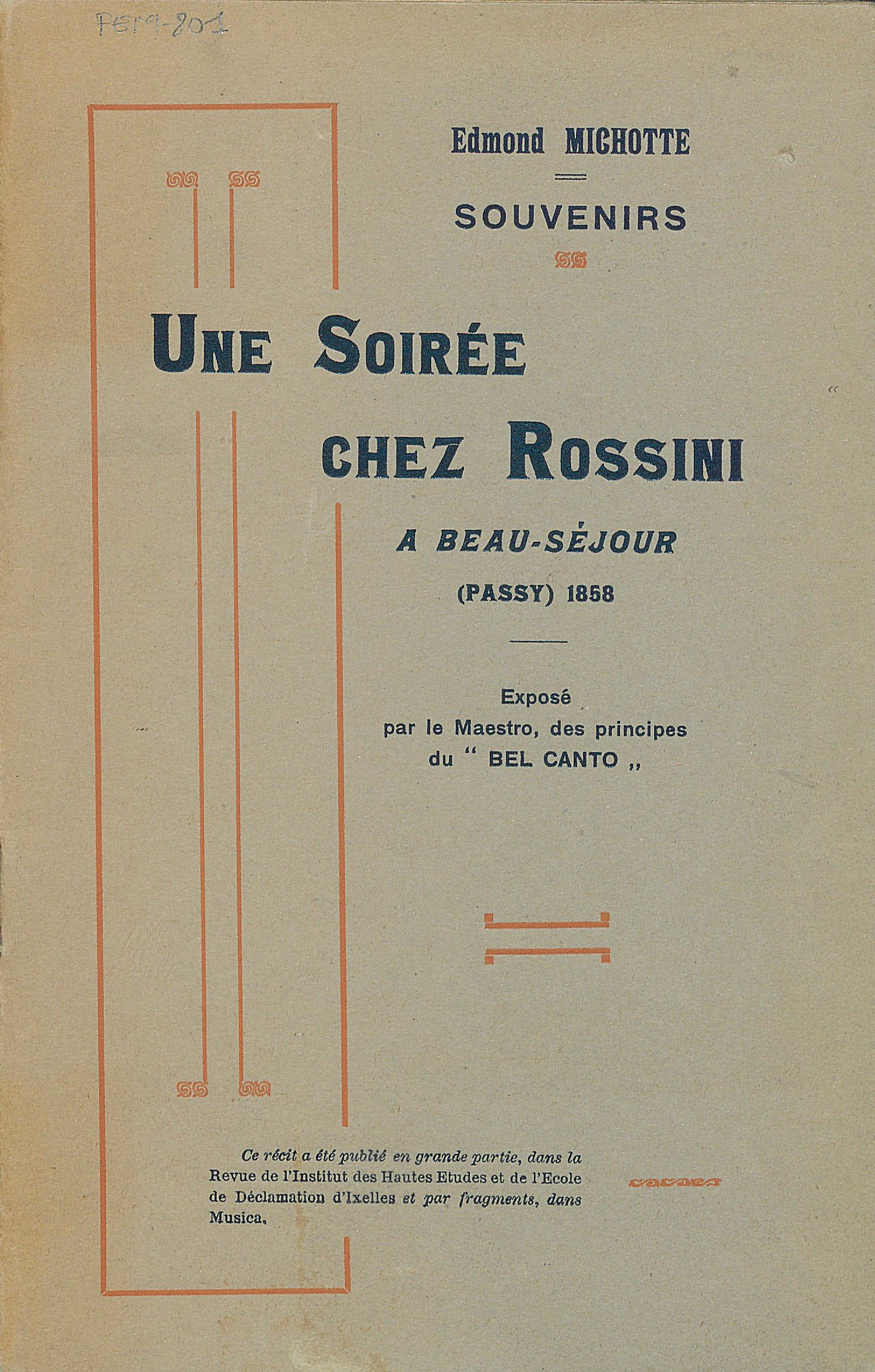 Livre de E. Michotte (Bibliothèque du Conservatoire royal de Bruxelles, B-Bc, FEM 801)